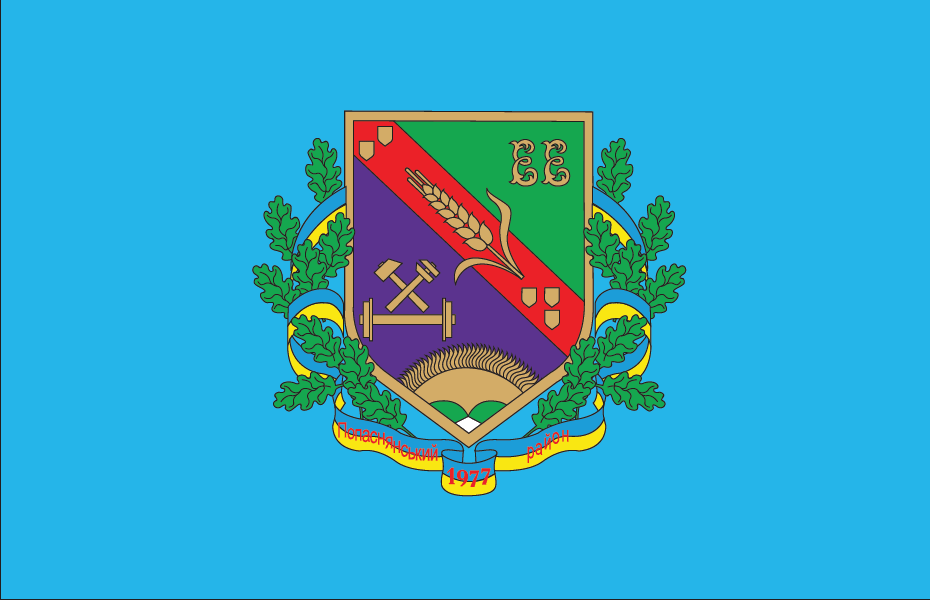 Прапор Попаснянського району